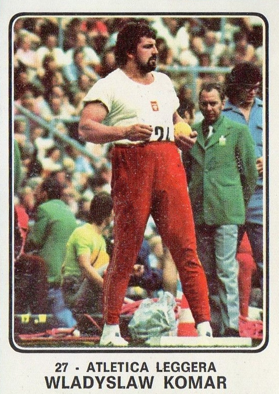 CAMPIONI dello SPORT 1973/74-Figurina n.27- KOMAR -ATLETICA LEGGERA-Rec